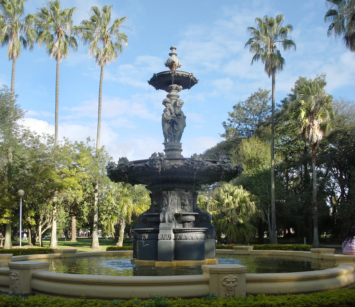 Chafariz de fero fundido no Parque Farroupilha, século XIX, Porto Alegre, Brasil